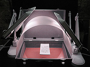 Koffer Studio